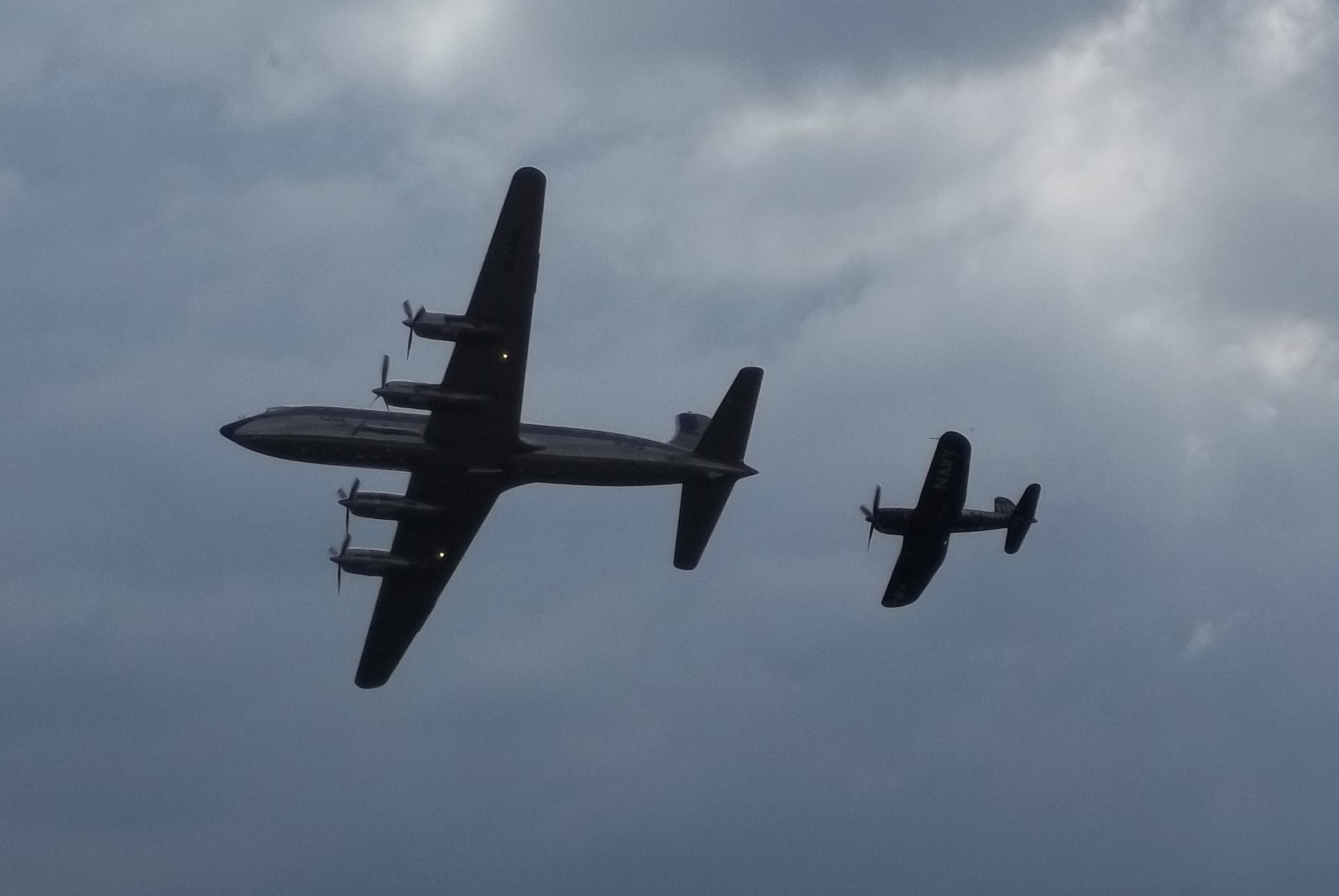 Douglas DC-6